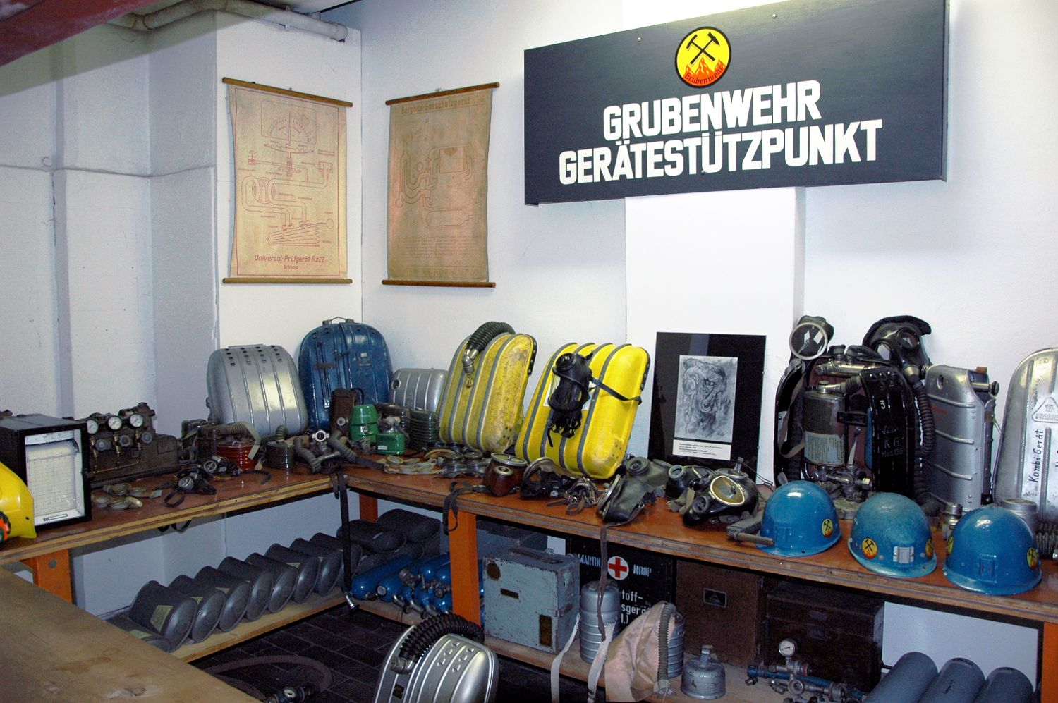 Gerätestützpunkt der Grubenwehr im Bergbaumuseum Oelsnitz/Erzgebirge beim Kaiserin-Augusta-Schacht.